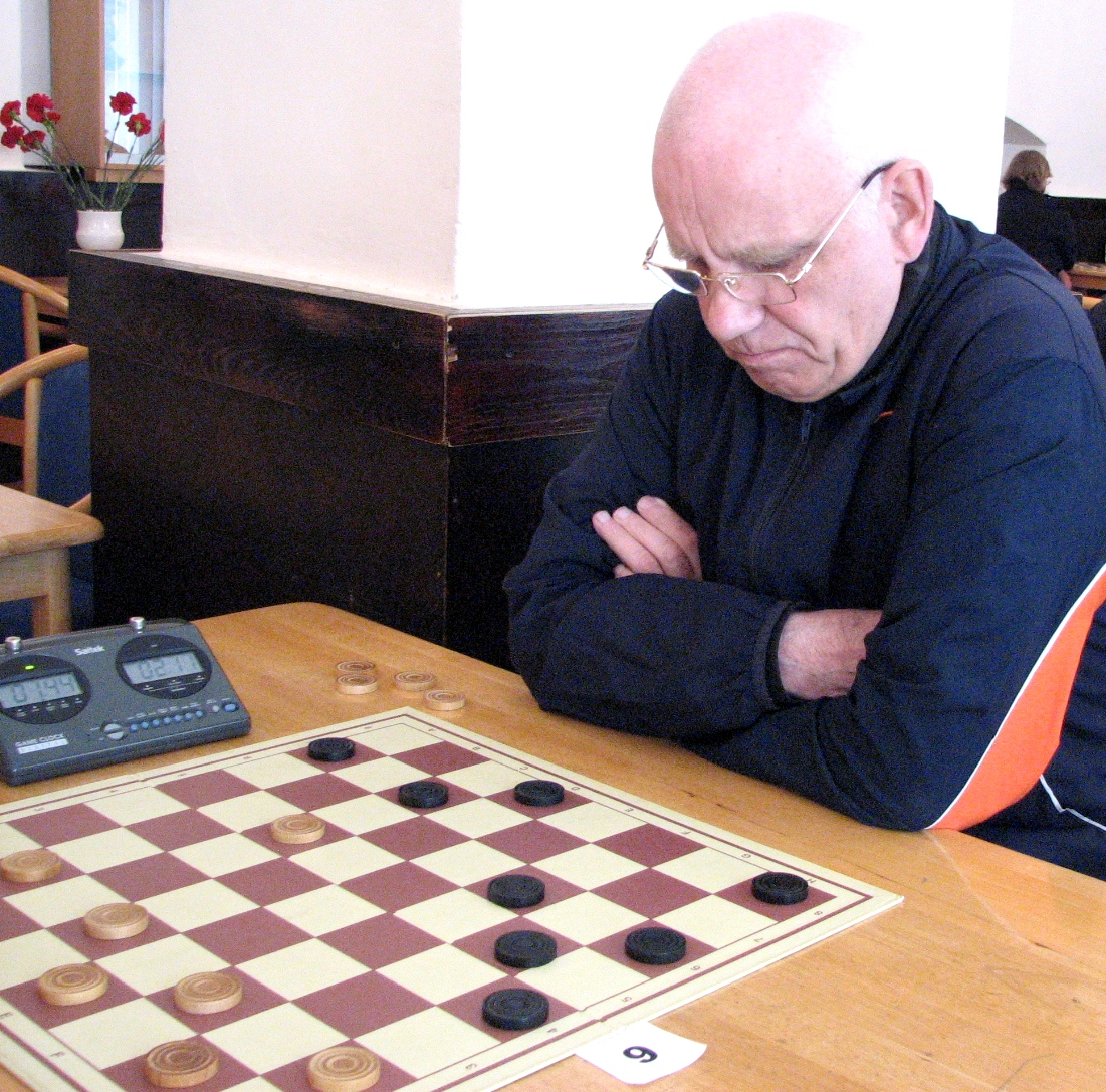 Mihkel-Kalju Tammeveski mängimas Eesti välkkabe meistrivõistlustel